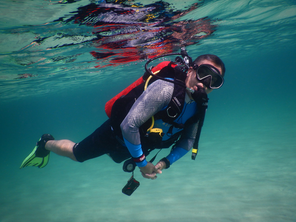 غواص اسکوبا